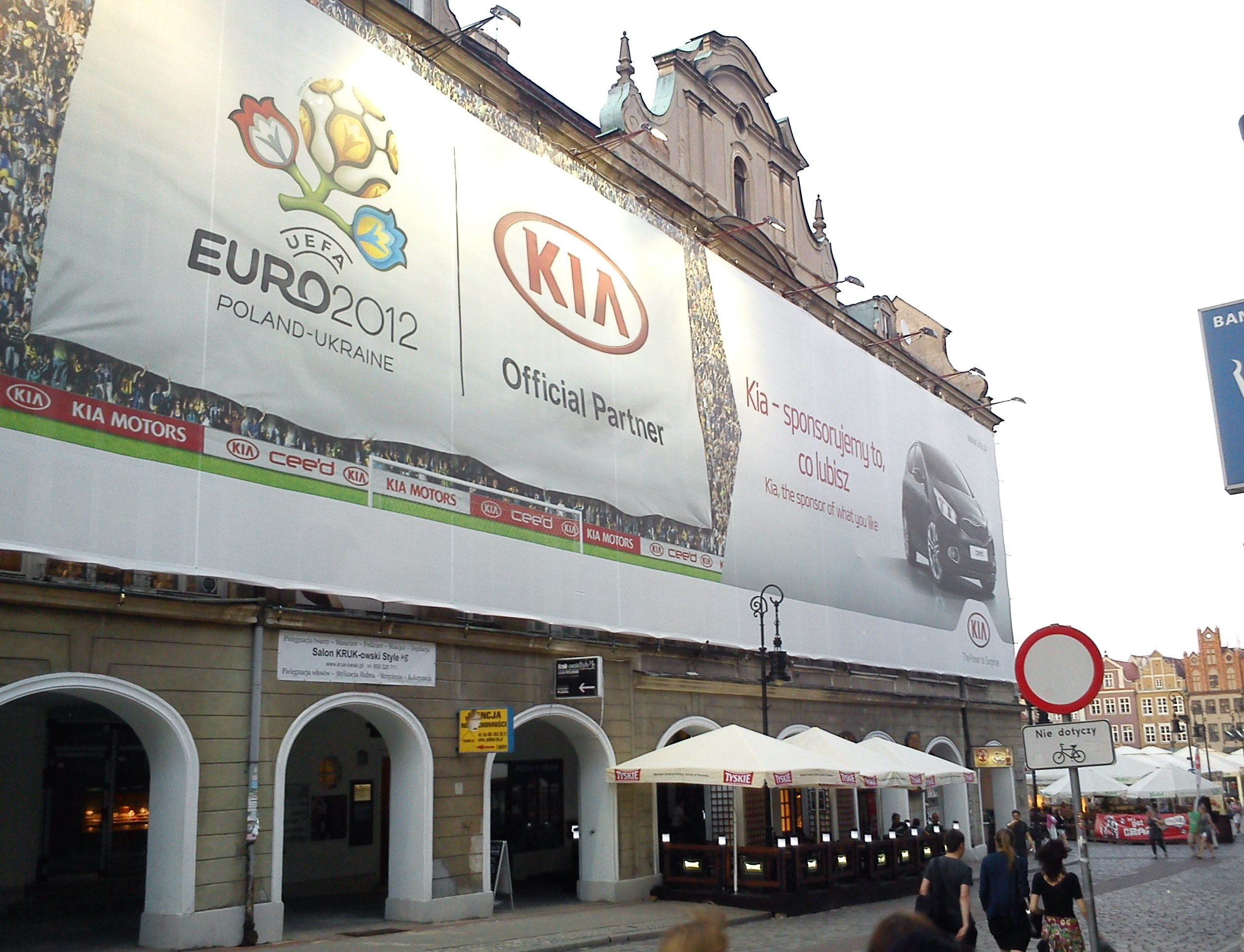 Poznań, ul. Paderewskiego, maj 2012r.